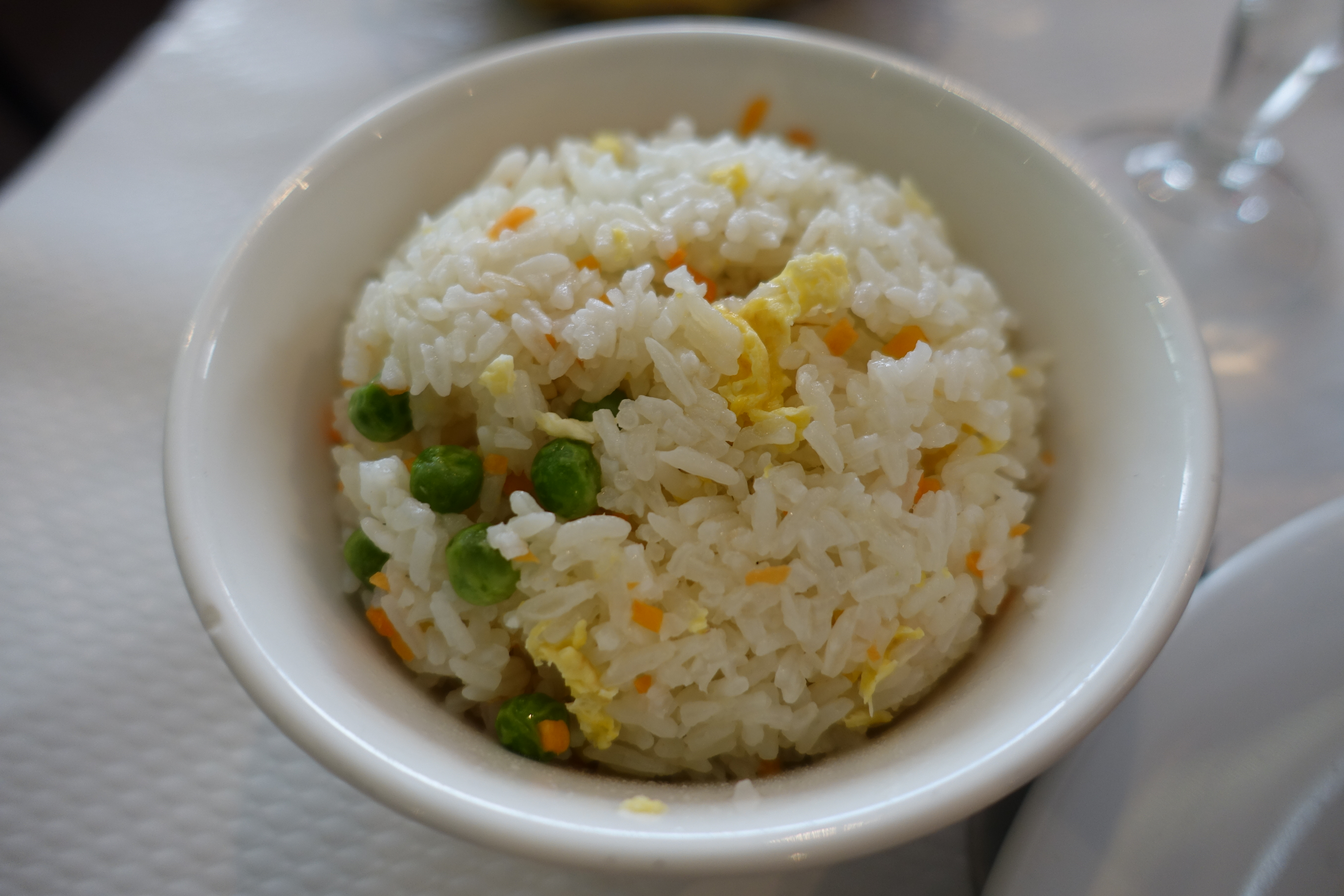 Cantonese Rice @ Porte du Bonheur @ Montparnasse @ Paris